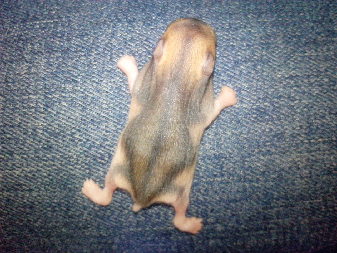 Ջունգարական գերմանամկան 7 օրական ձագ